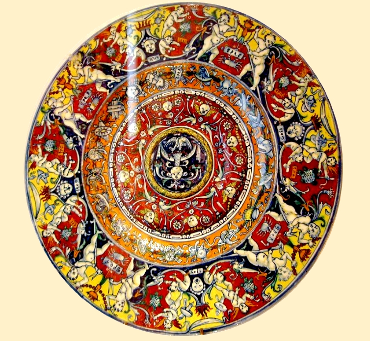 Antico bacile datato 1509 e chiamato "Il Rosso di Montelupo" a causa del pigmento di colore rosso usato per la sua decorazione.